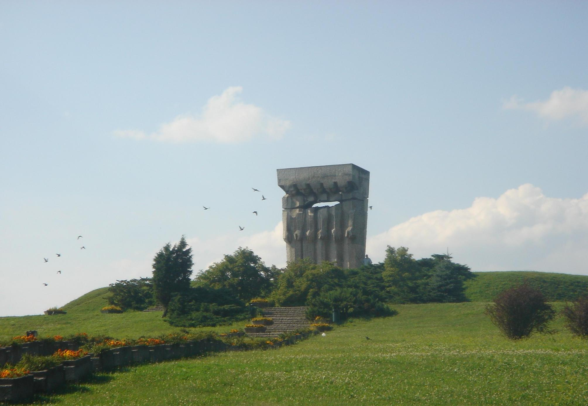 המחנה he:פלאשוב שבפולין כיום